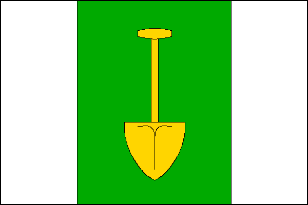 vlajka, Žákovice, okres Přerov